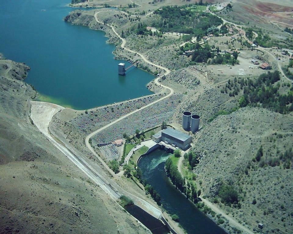 Ankara Bala Kesikköprü Barajı-1